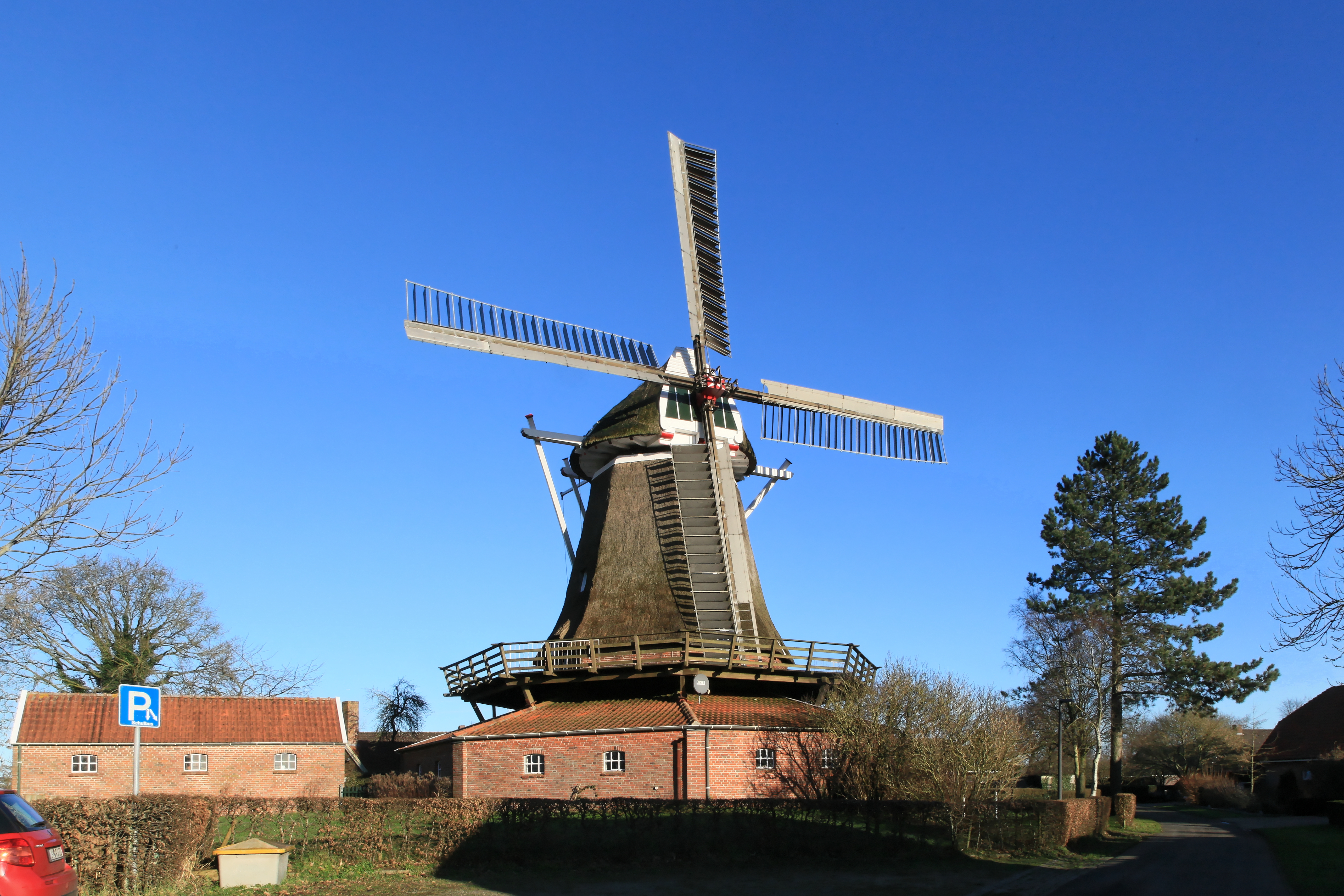 Mühle Mitling-Mark, Marker Mühlenweg in Mitling-Mark, Westoverledingen